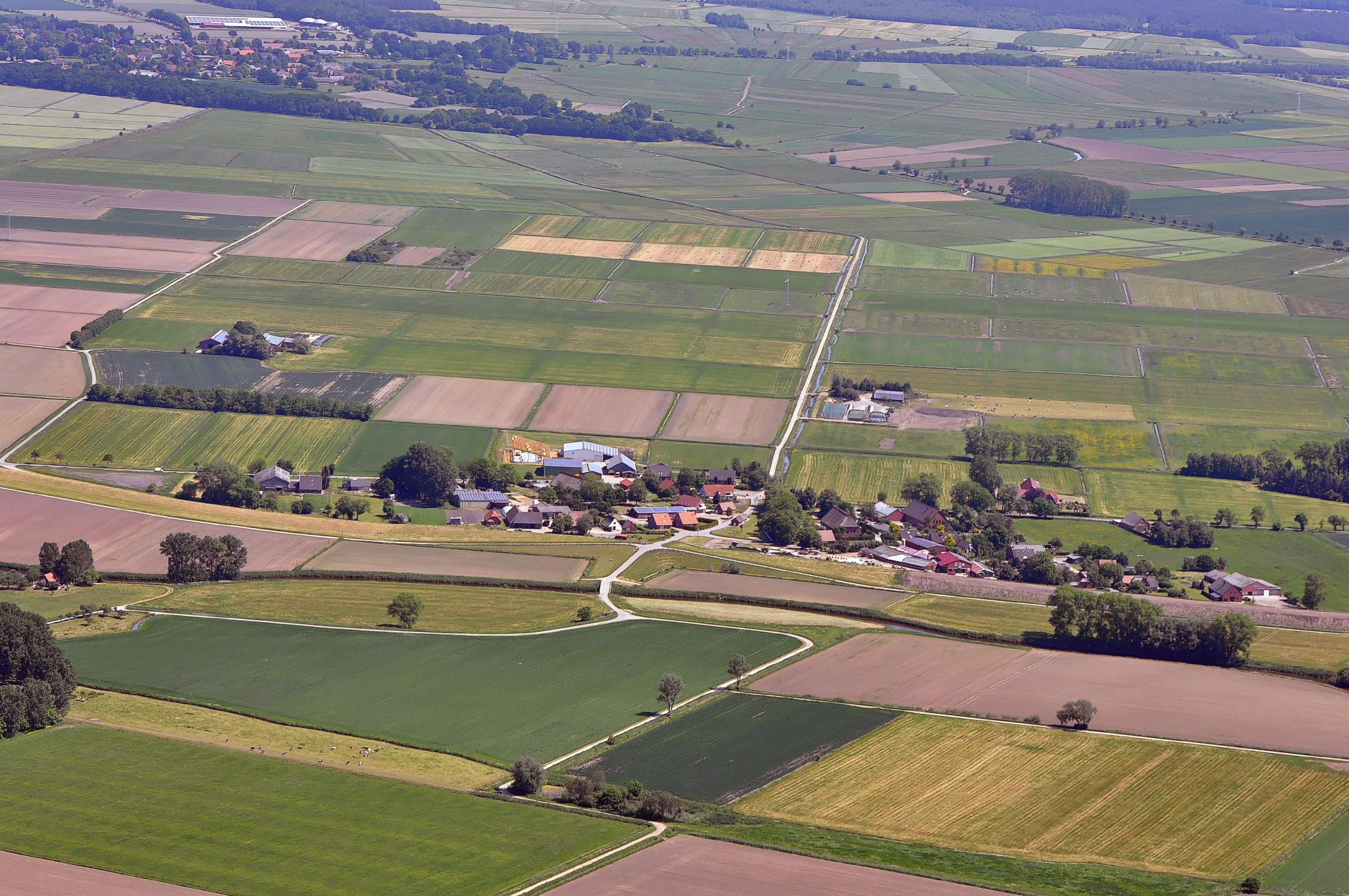 Wurthfleth in der Gemeinde Sandstedt. Luftbilder von der Nordseeküste 2012-05